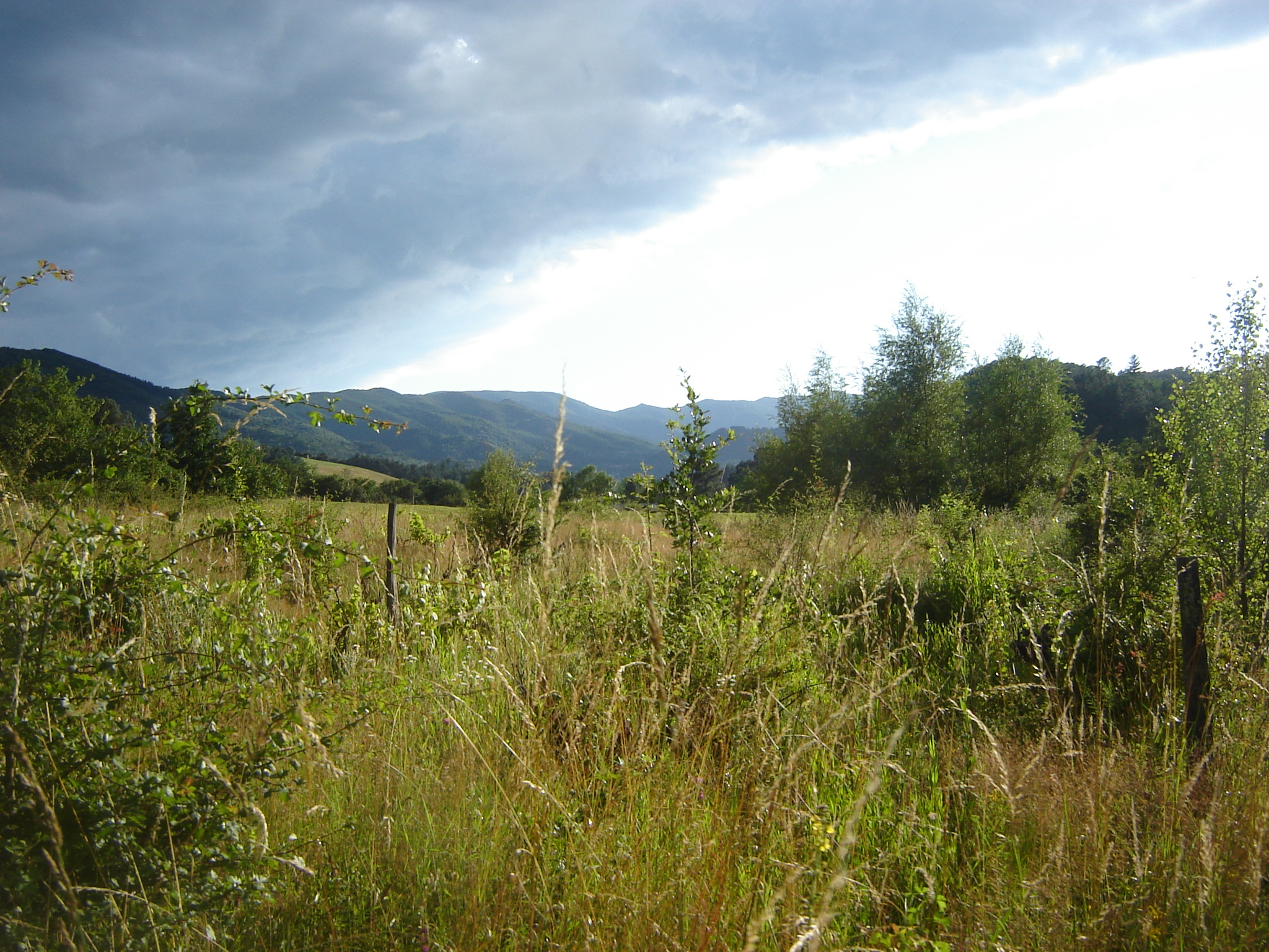 valée de Prades, petit village du sud de l'Ardèche